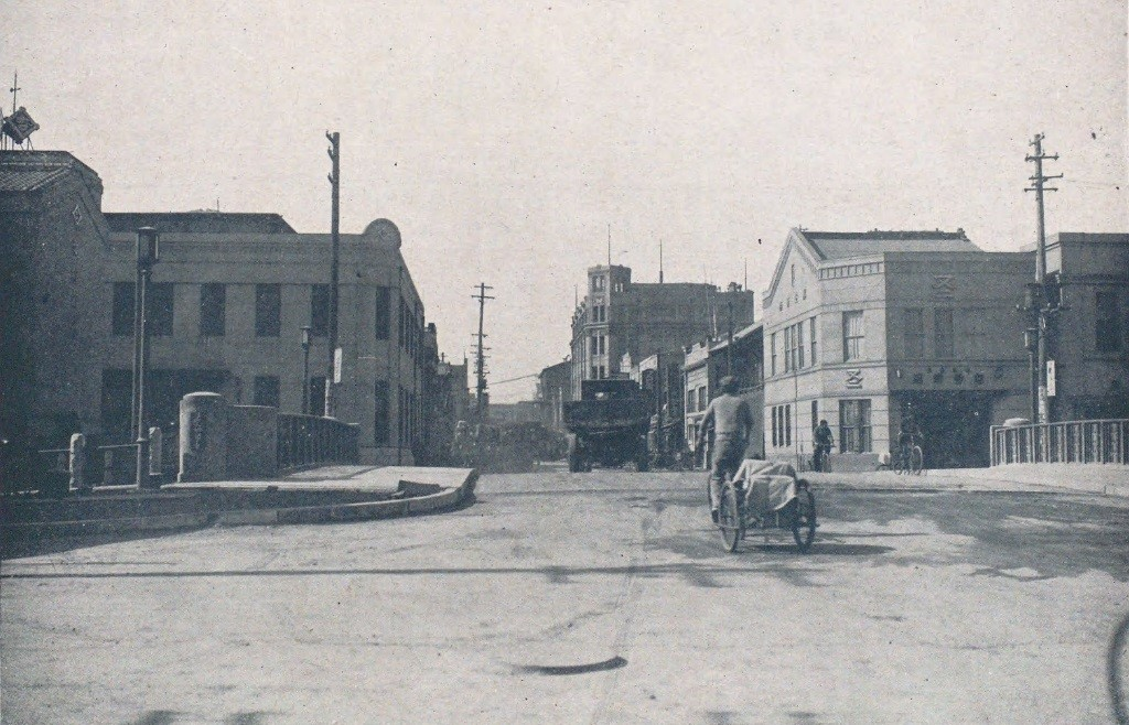 田所町 のちの日本橋堀留町２丁目